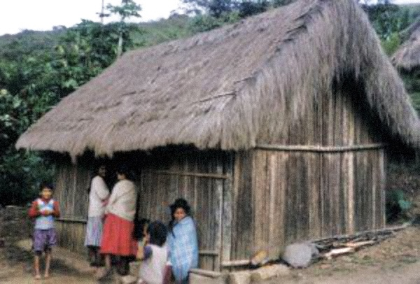 Indijanci Quechuas de Tuichi, nastanjeni u džunglama gornjeg toka Tuichija, Bolivija. Govore jezikom quechua tuichi. Quechua-Indianer am Oberlauf des Tuichi. Qhichwa runakuna Tuychi mayu patapi. Suradnik:Zeljko-pa rurasqan